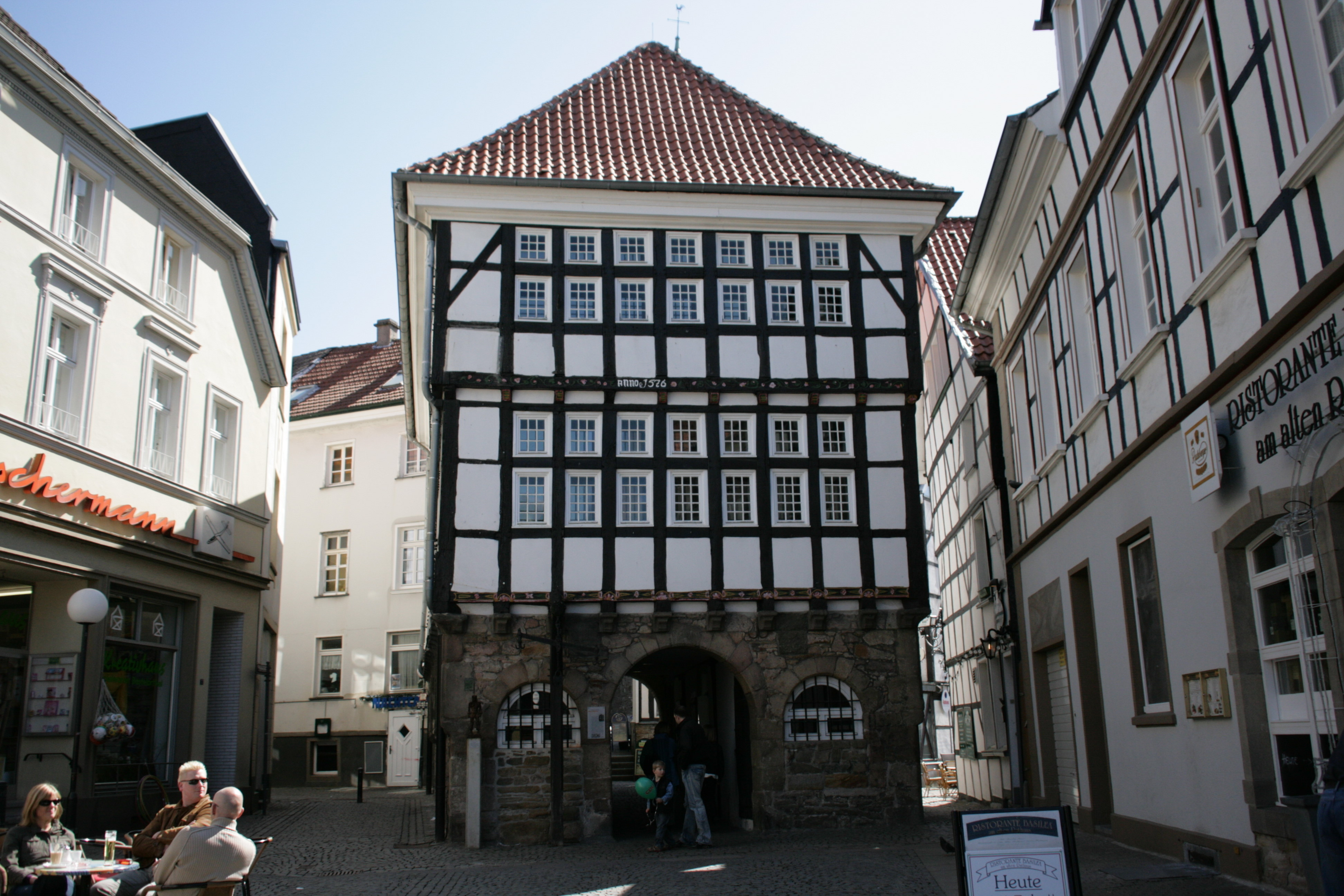 Altes Rathaus am Untermarkt in Hattingen, rechts Haus Untermarkt 10